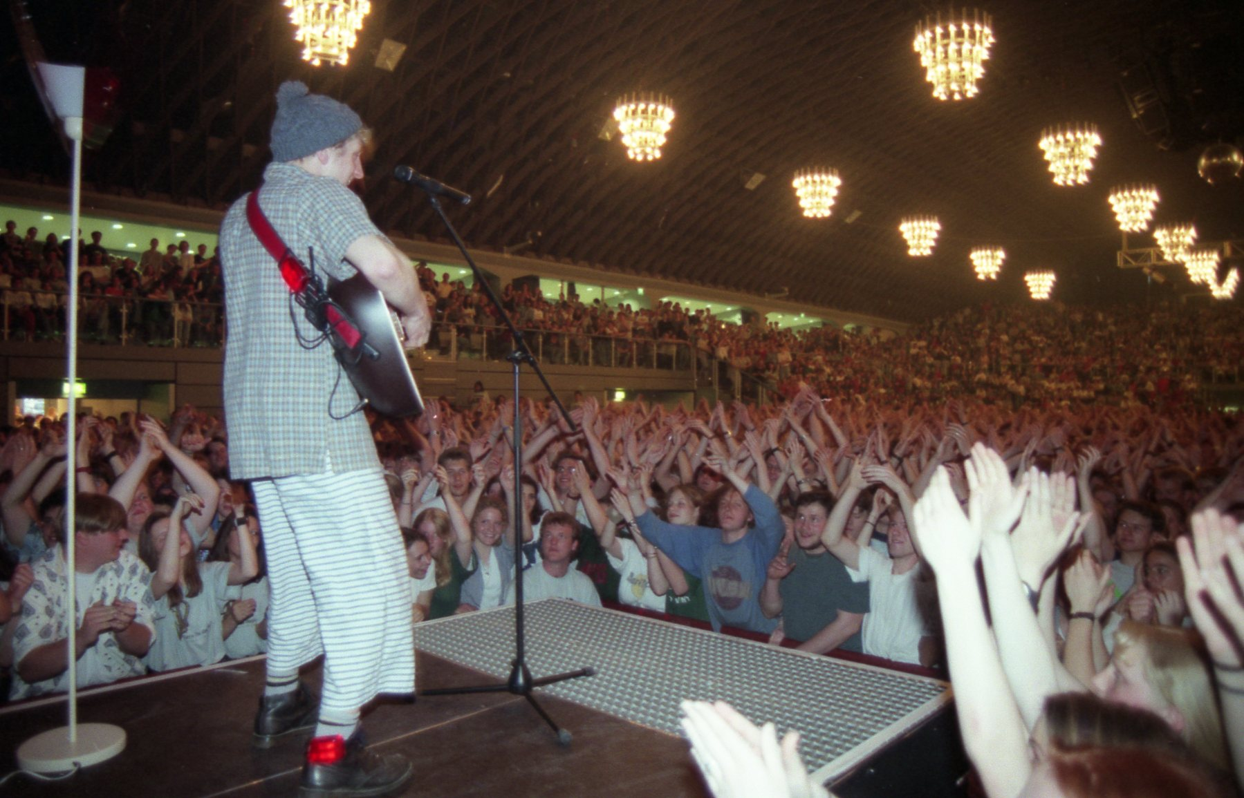 Kuersche auf Supporttour für Fury in the Slaughterhouse 1995